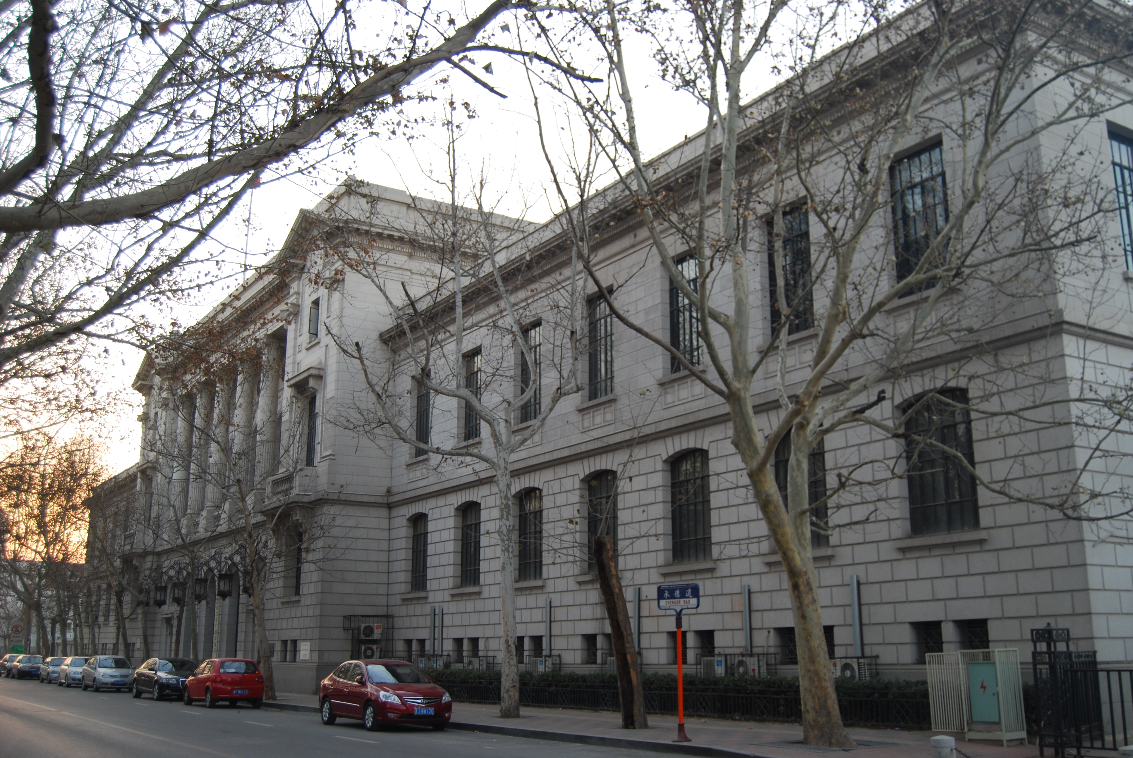 天津